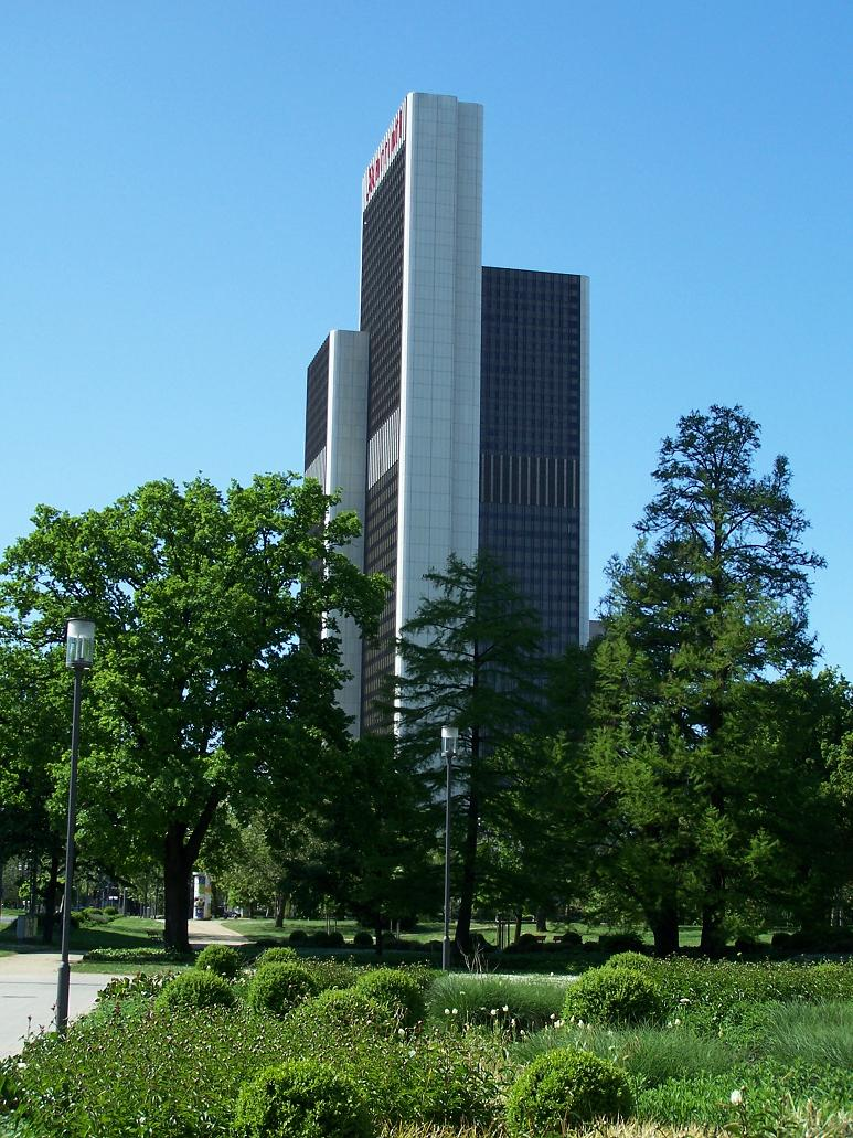 Westend Gate (ehem. Plaza Büro Center), Marriott Hotel, Frankfurt am Main